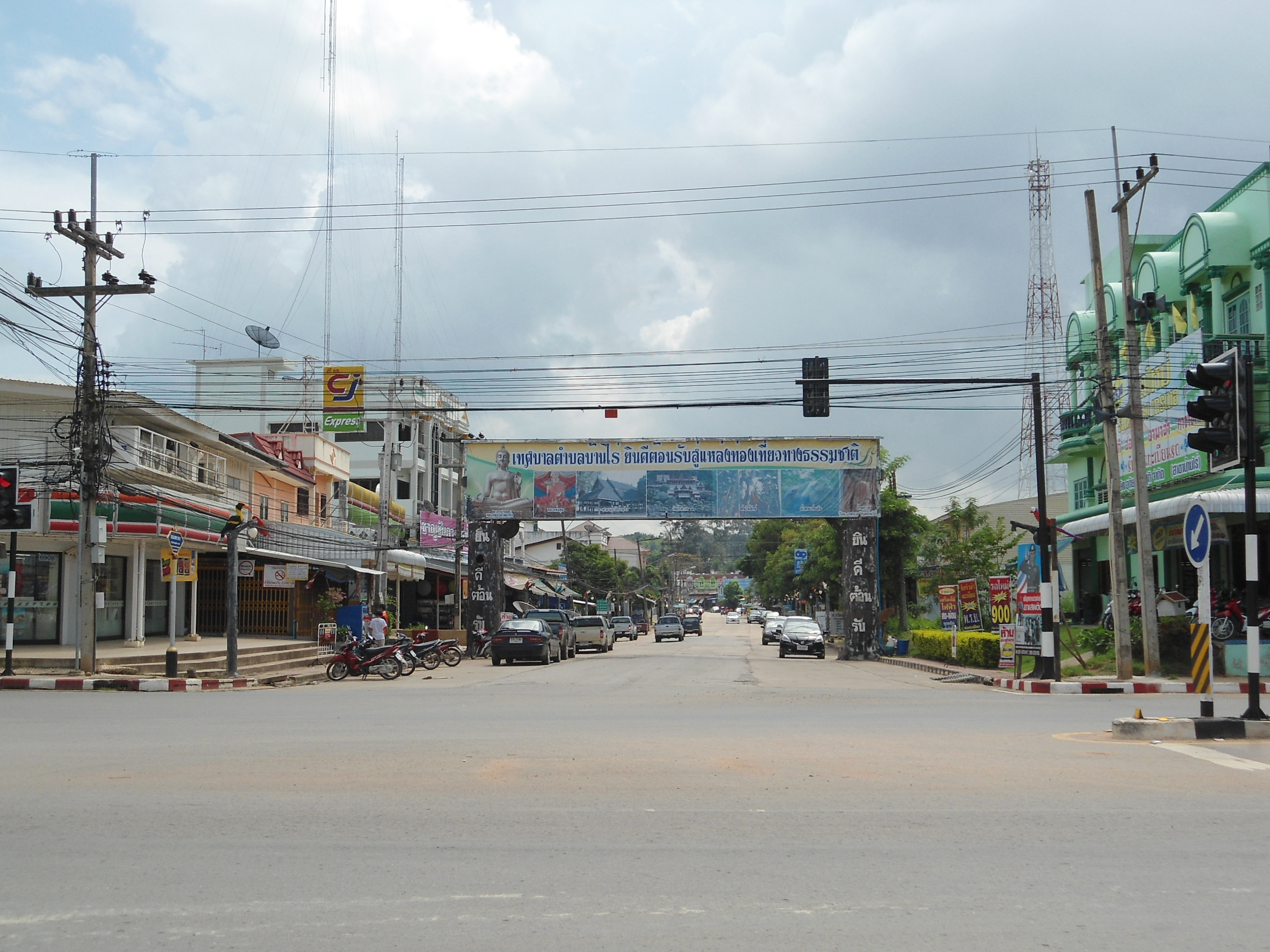 ตัวอำเภอบ้านไร่ ในเขตเทศบาลตำบลบ้านไร่, Ban Rai District